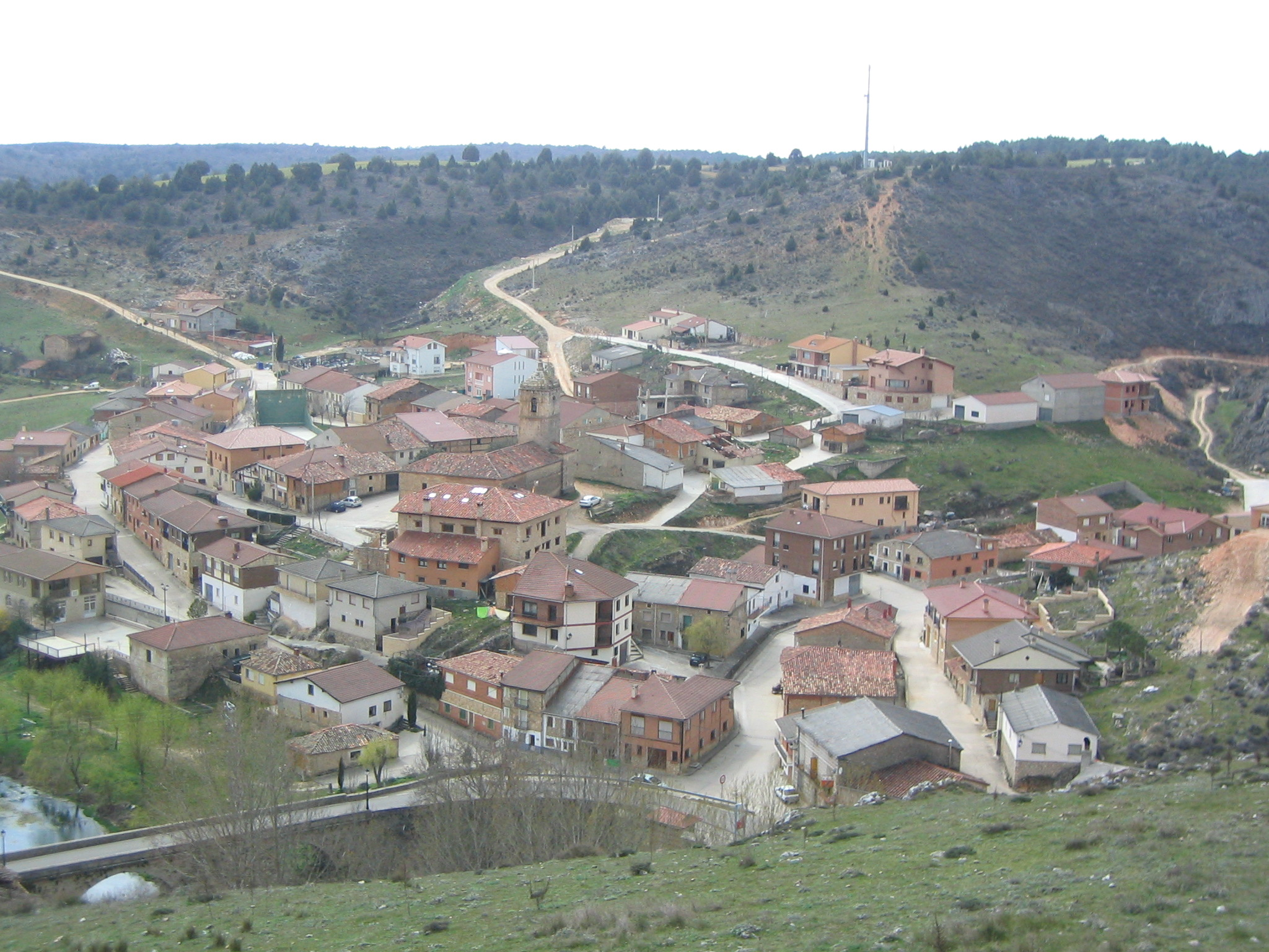 Ucero, Soria (Castilla León) (España).